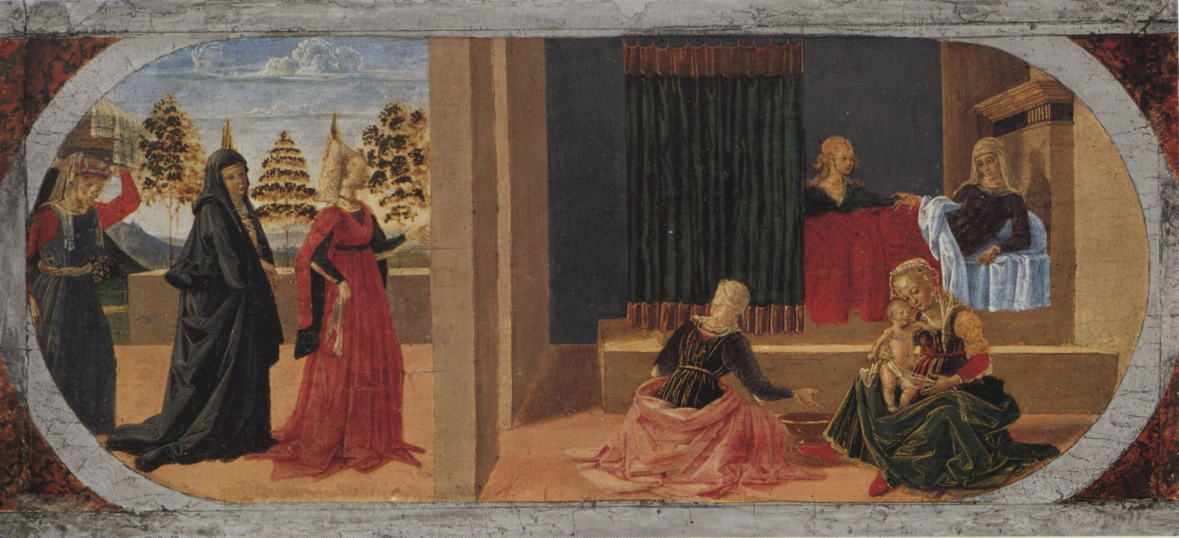 Pietro Perugino: Nascita della Vergine. Cat. no. 2 in Vittoria Garibaldi: Perugino. Catalogo completo. Octavo, Firenze 2000, ISBN 88-8030-091-1